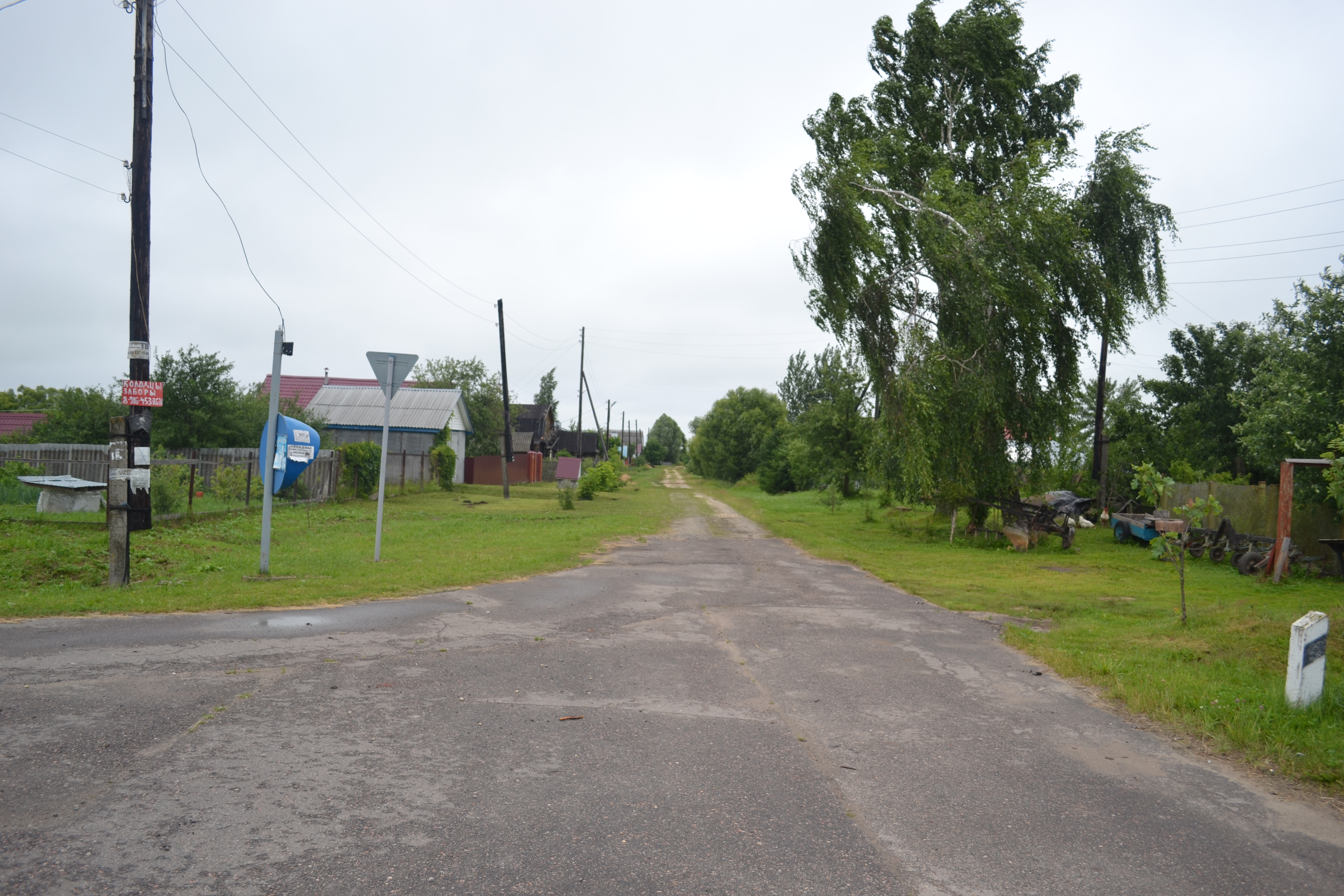 Улица в деревне Высокорево